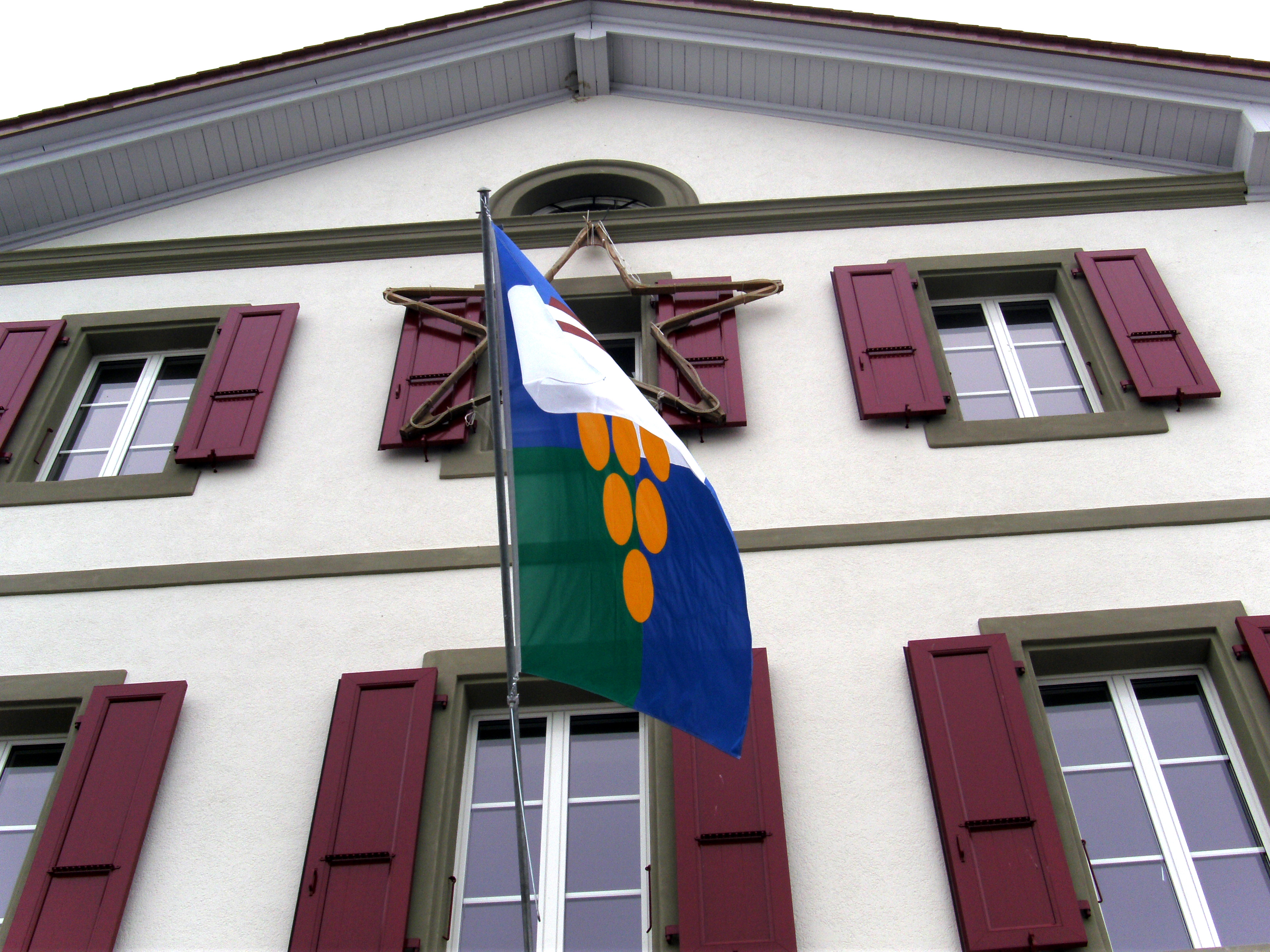 Collège de Chabrey